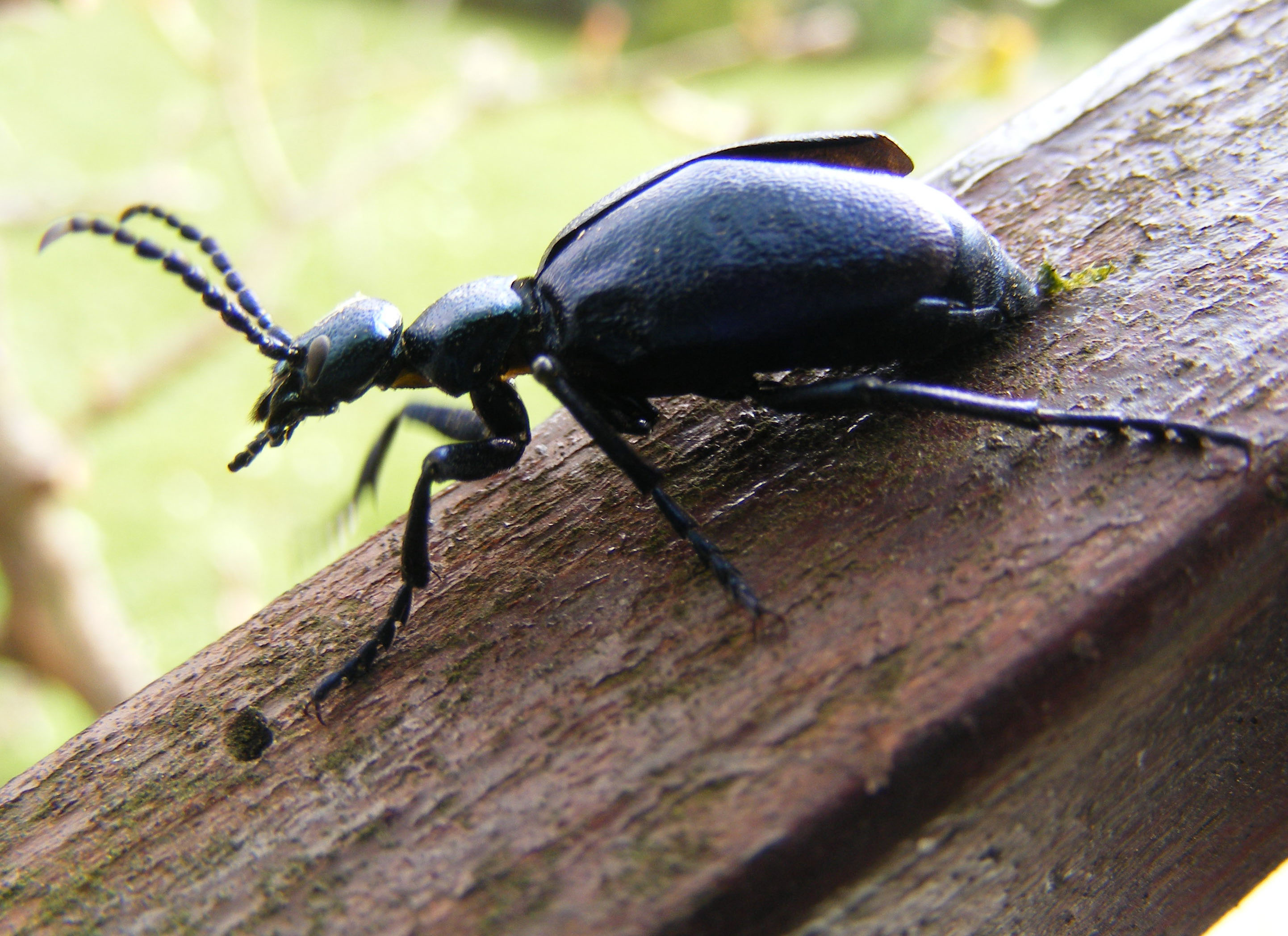 Oleica fioletowa-meloe violaceus